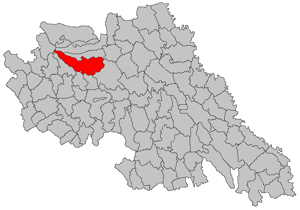 Categorie:Hărţi ale judeţului Iaşi